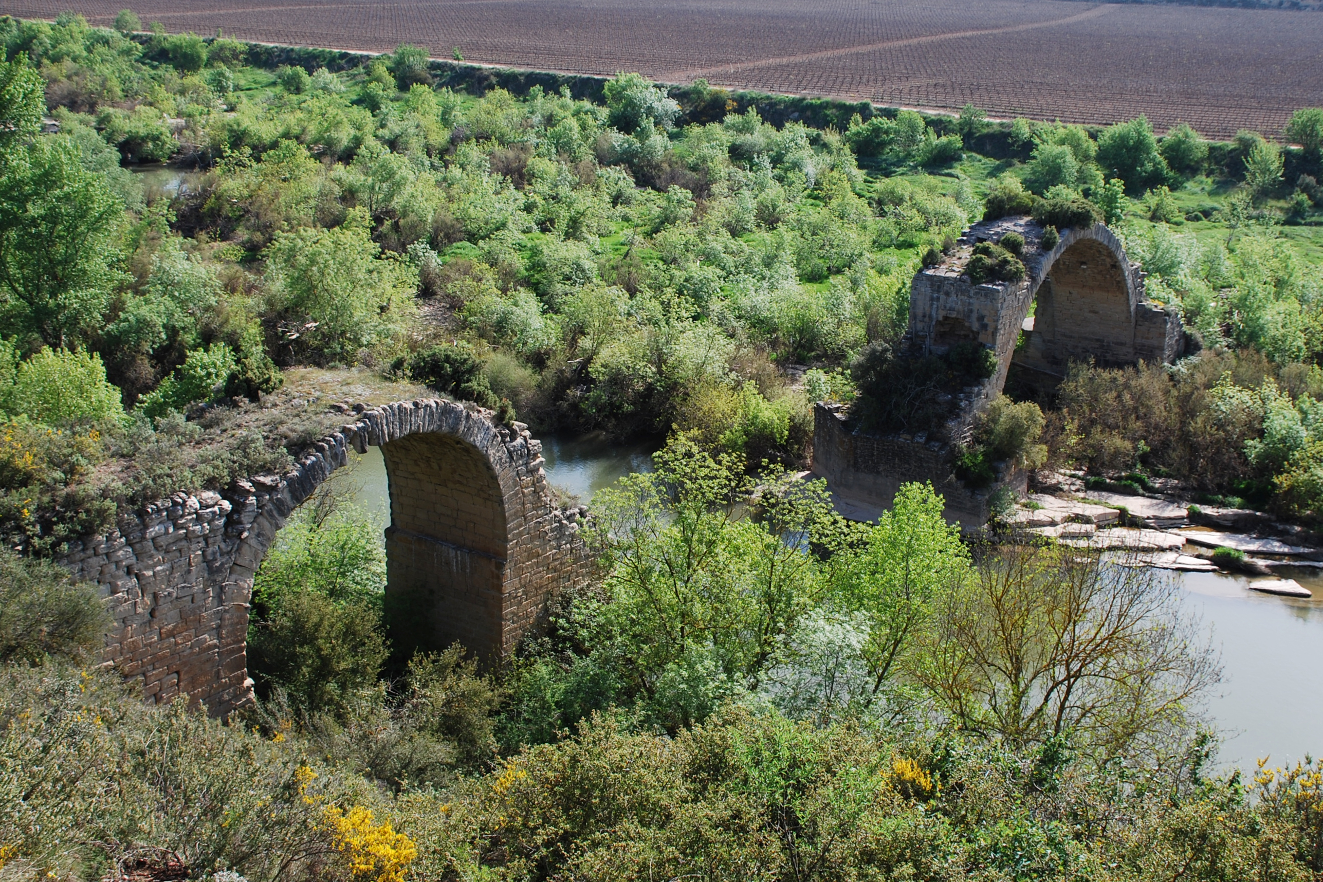 Puente romano de Mantible, sobre el río Ebro, entre La Rioja y el País Vasco (España).